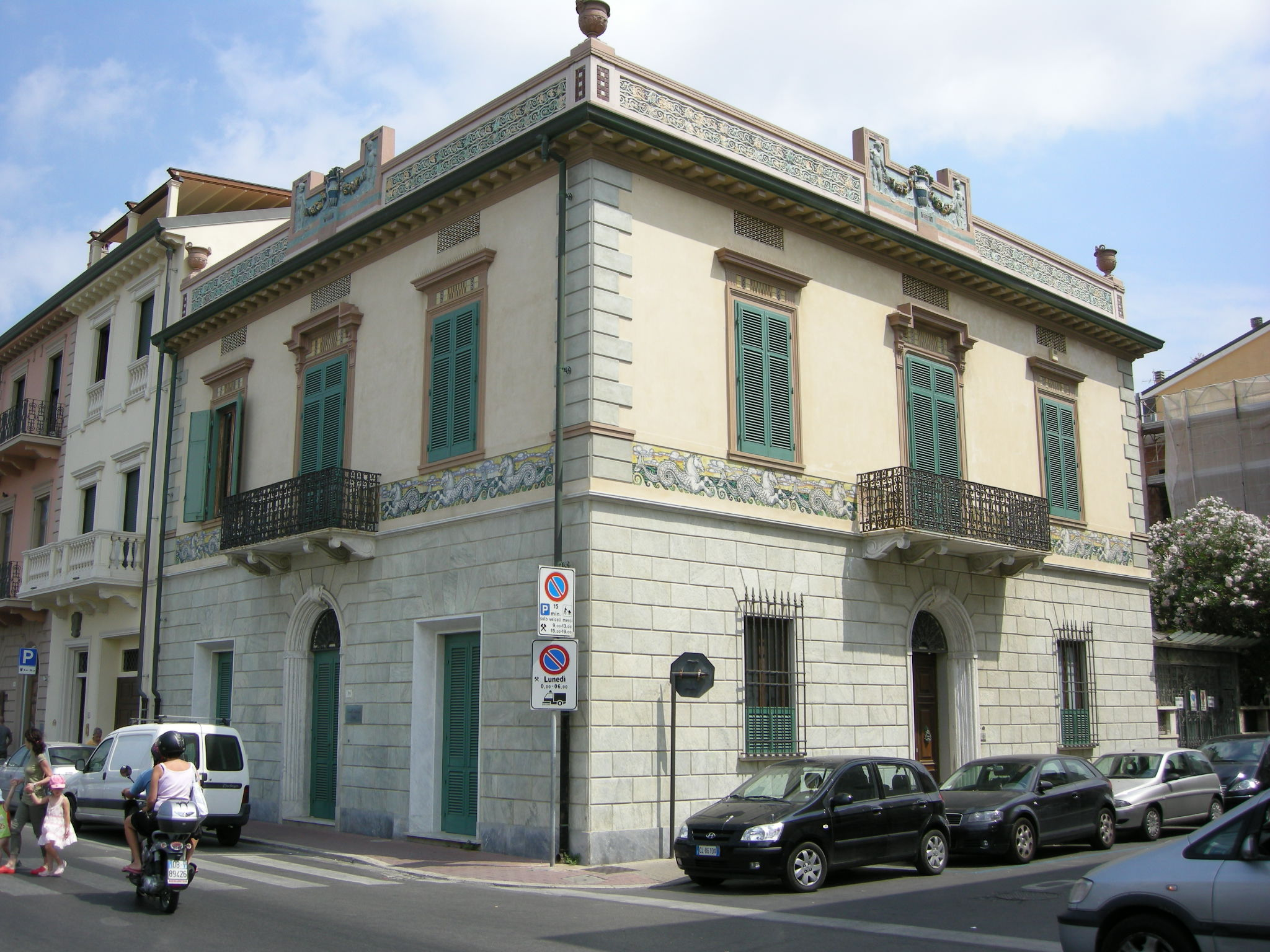 Villino Tolomei